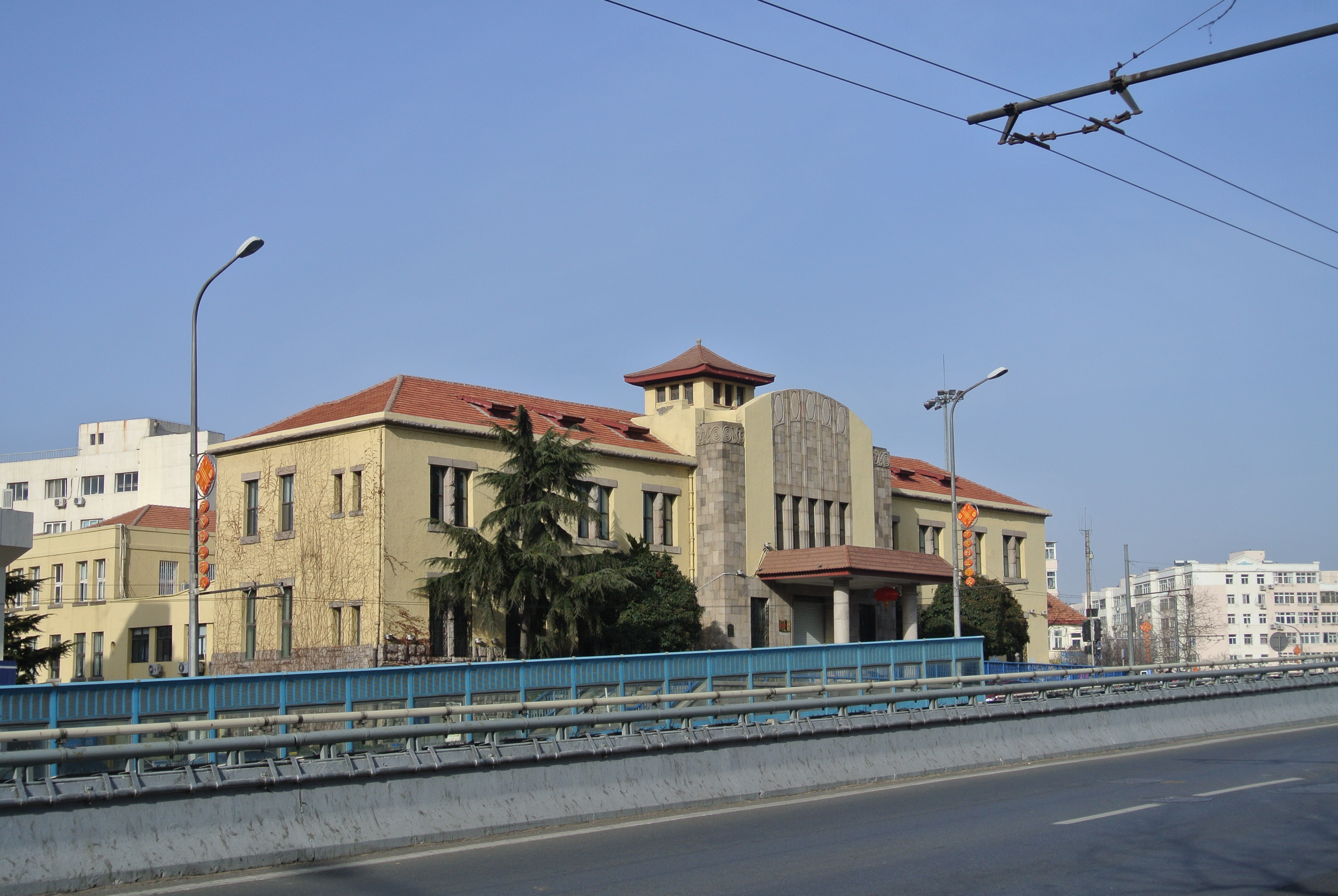 青岛普济医院